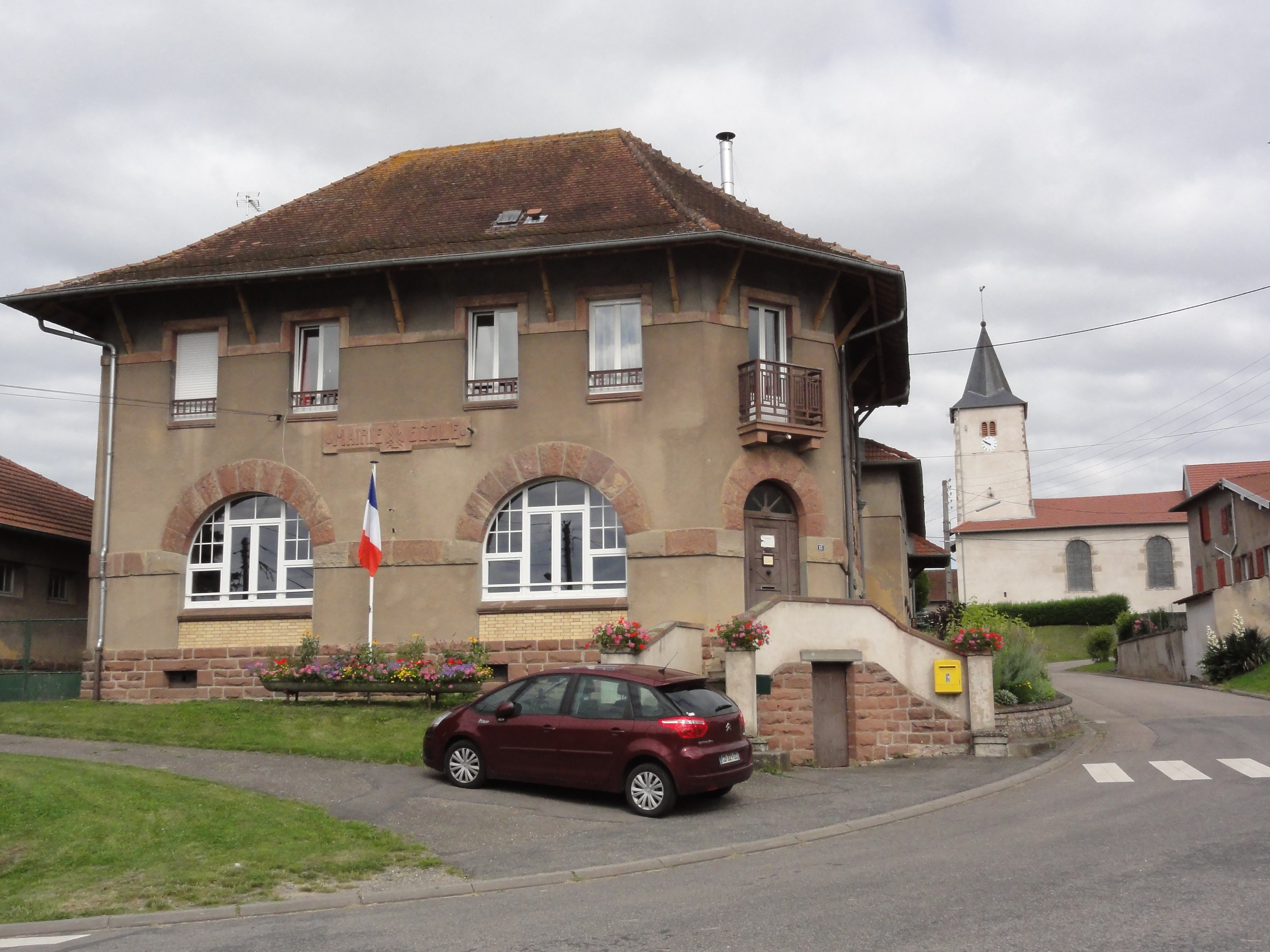 Manonviller (M-et-M) mairie